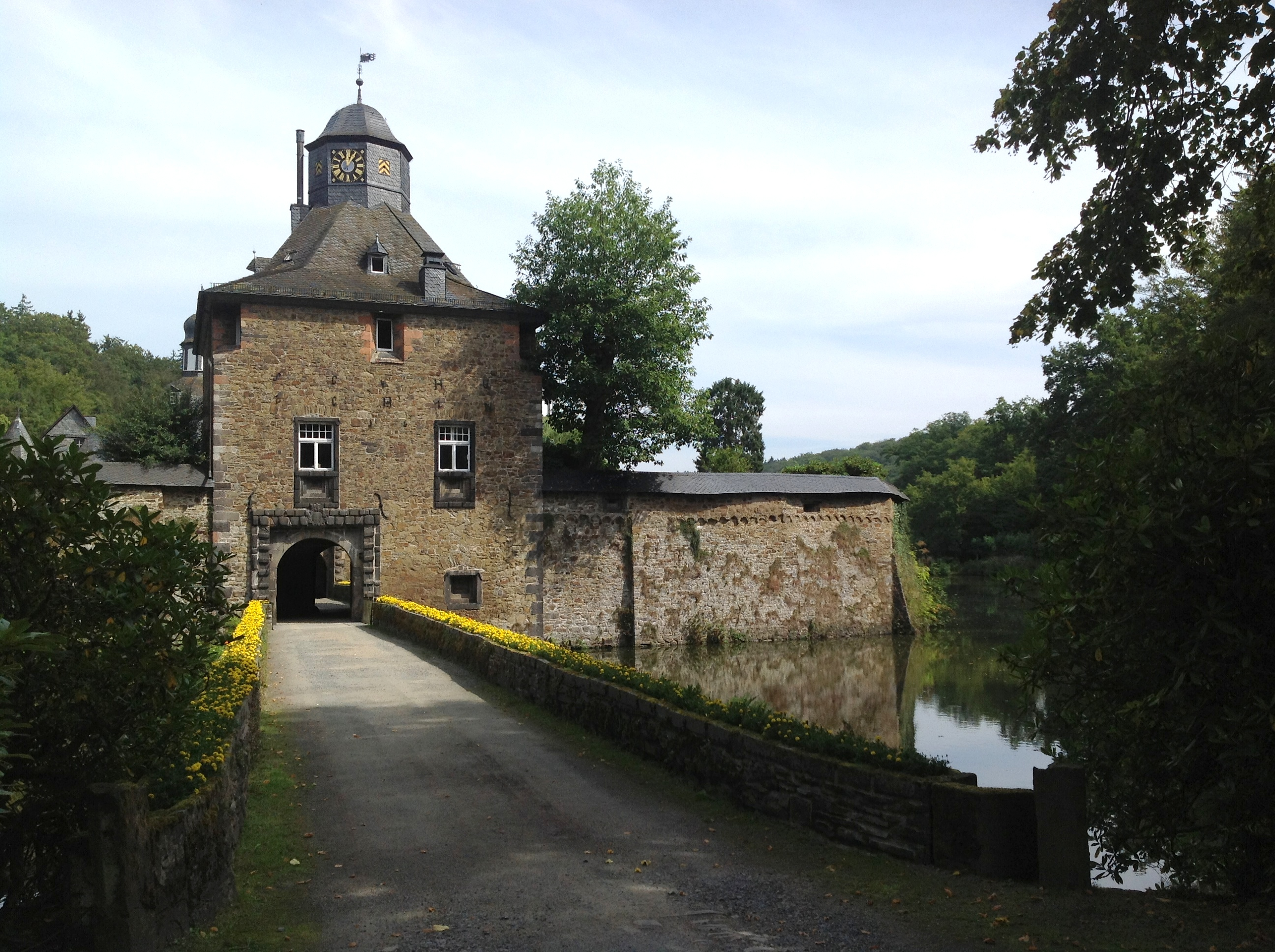 Schloss Crottorf, Landkreis Altenkirchen (Westerwald).